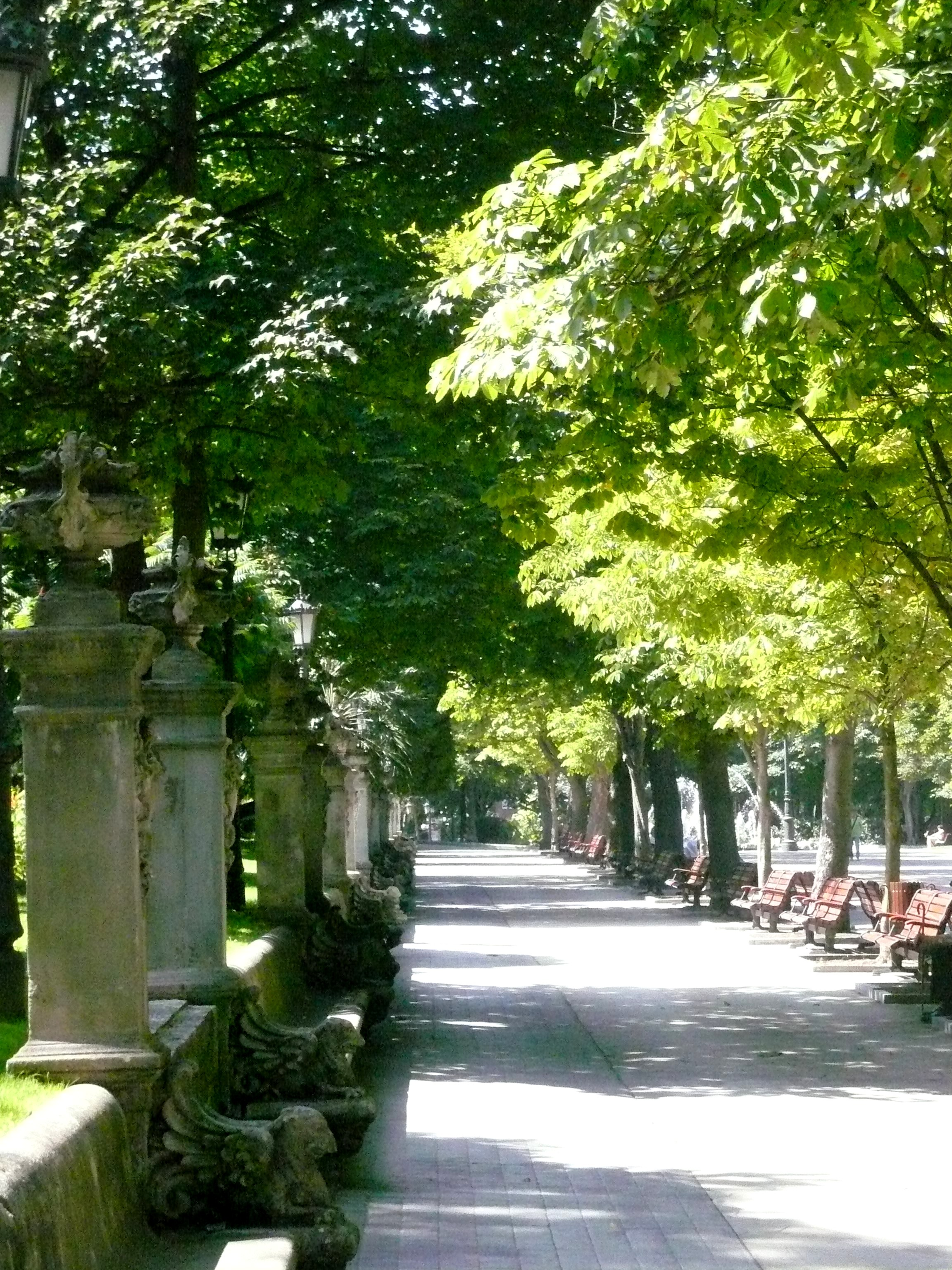 paseobombe